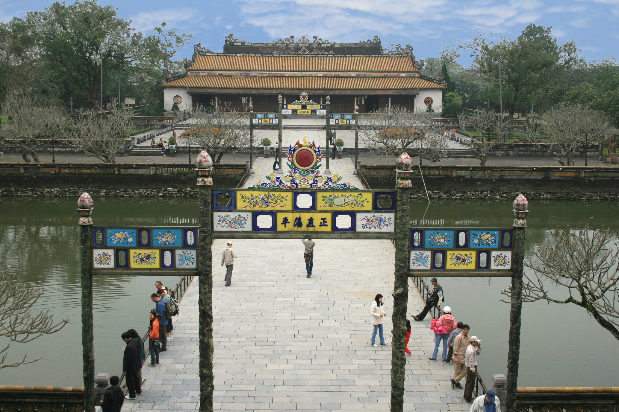 Điện Thái Hoà (Palace of Supreme Harmony) tại Đại Nội, Huế (Great Enclosure, Hue)